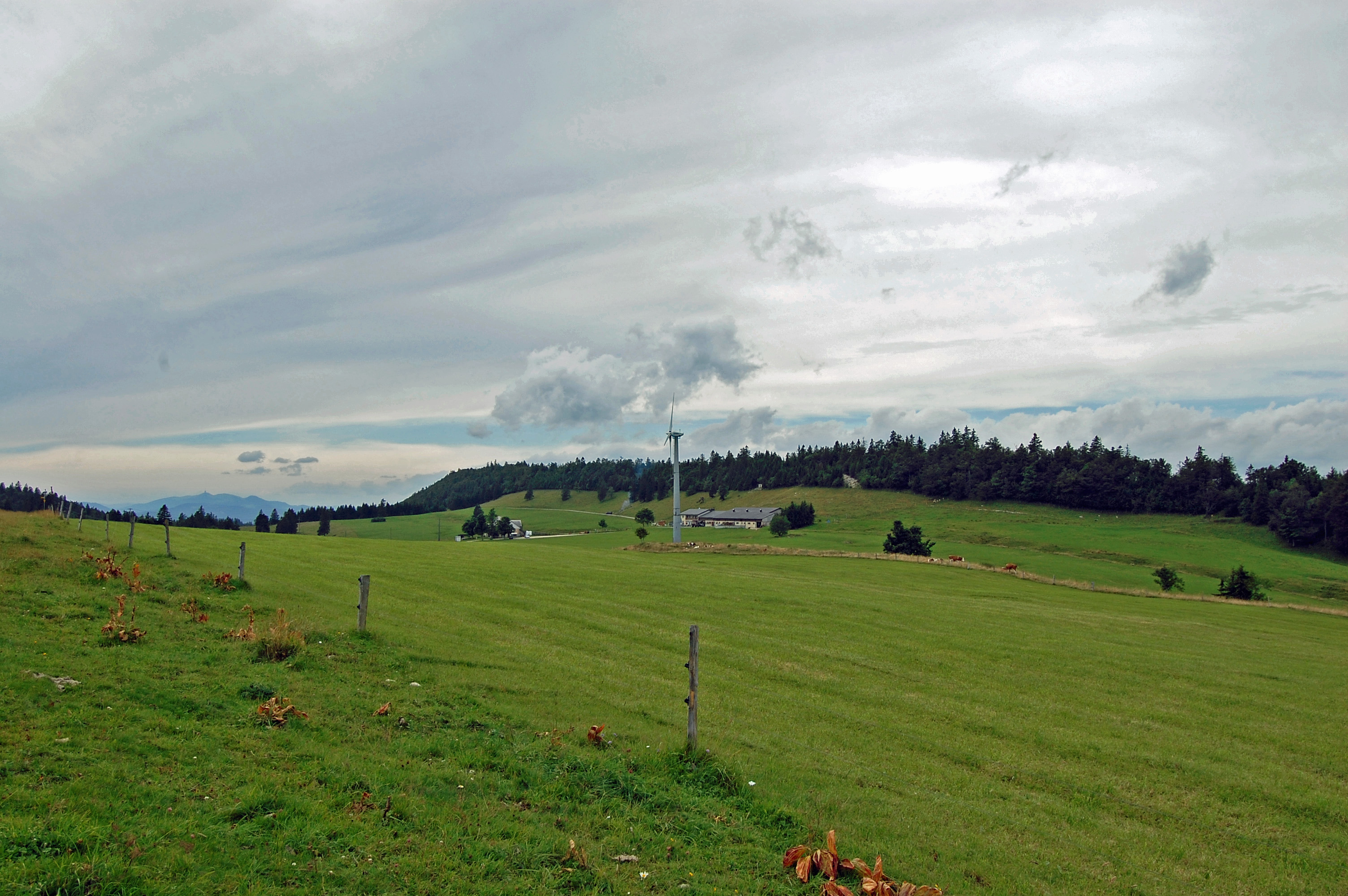 Grenchenberg